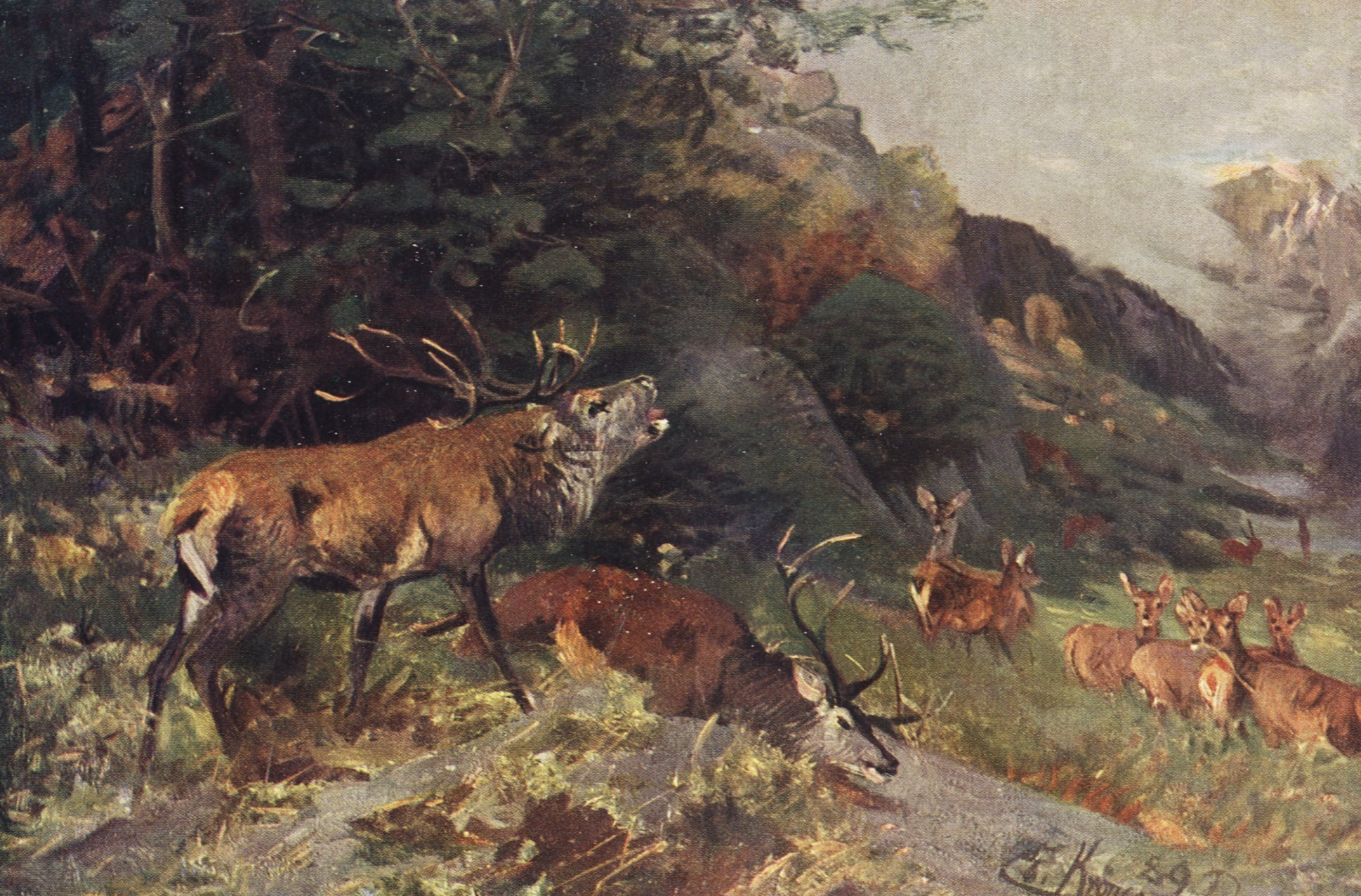 Hirschkampf, Gemälde von Prof. Johann Christian Kröner